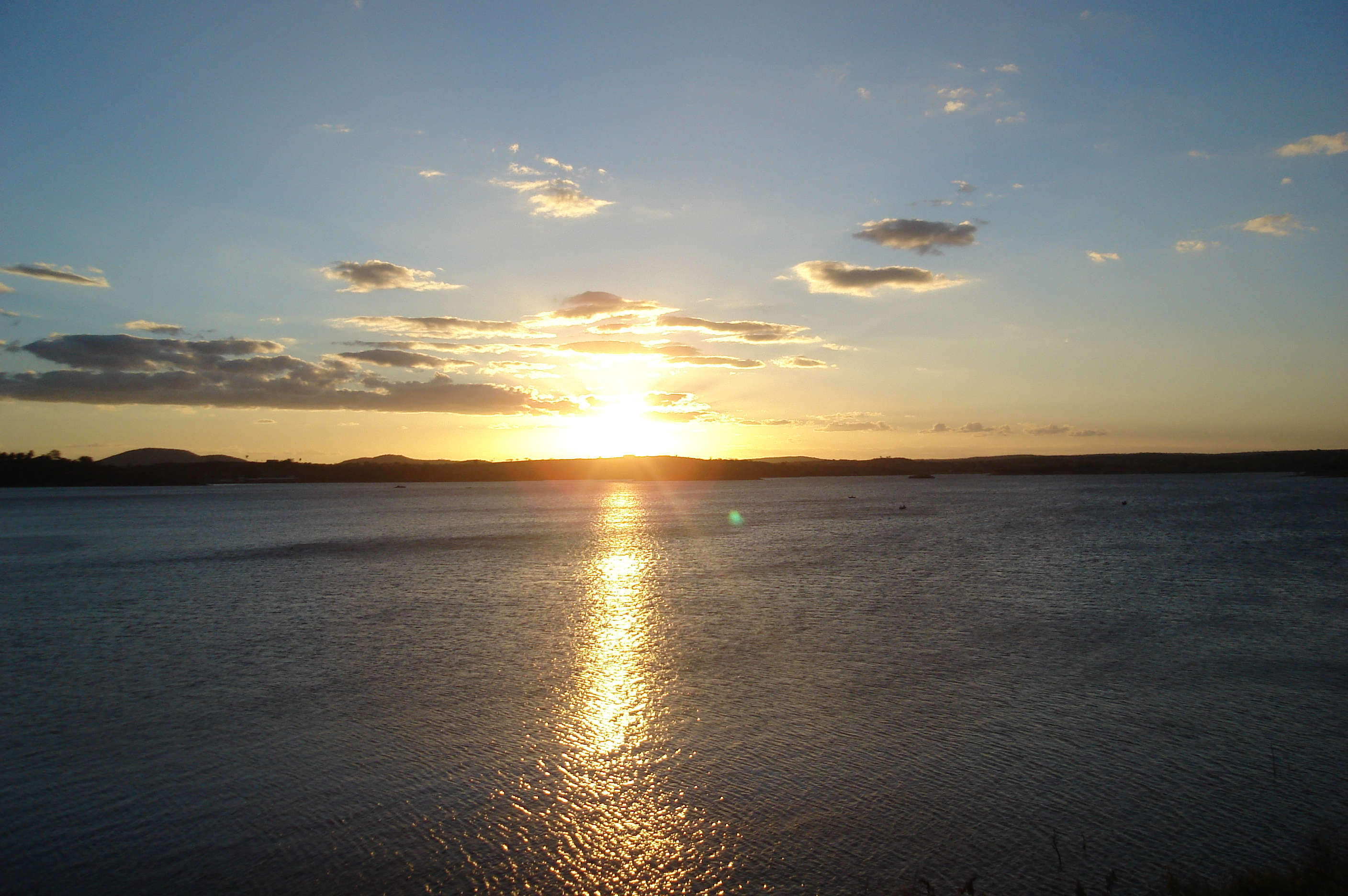 Pôr do Sol em Boqueirão